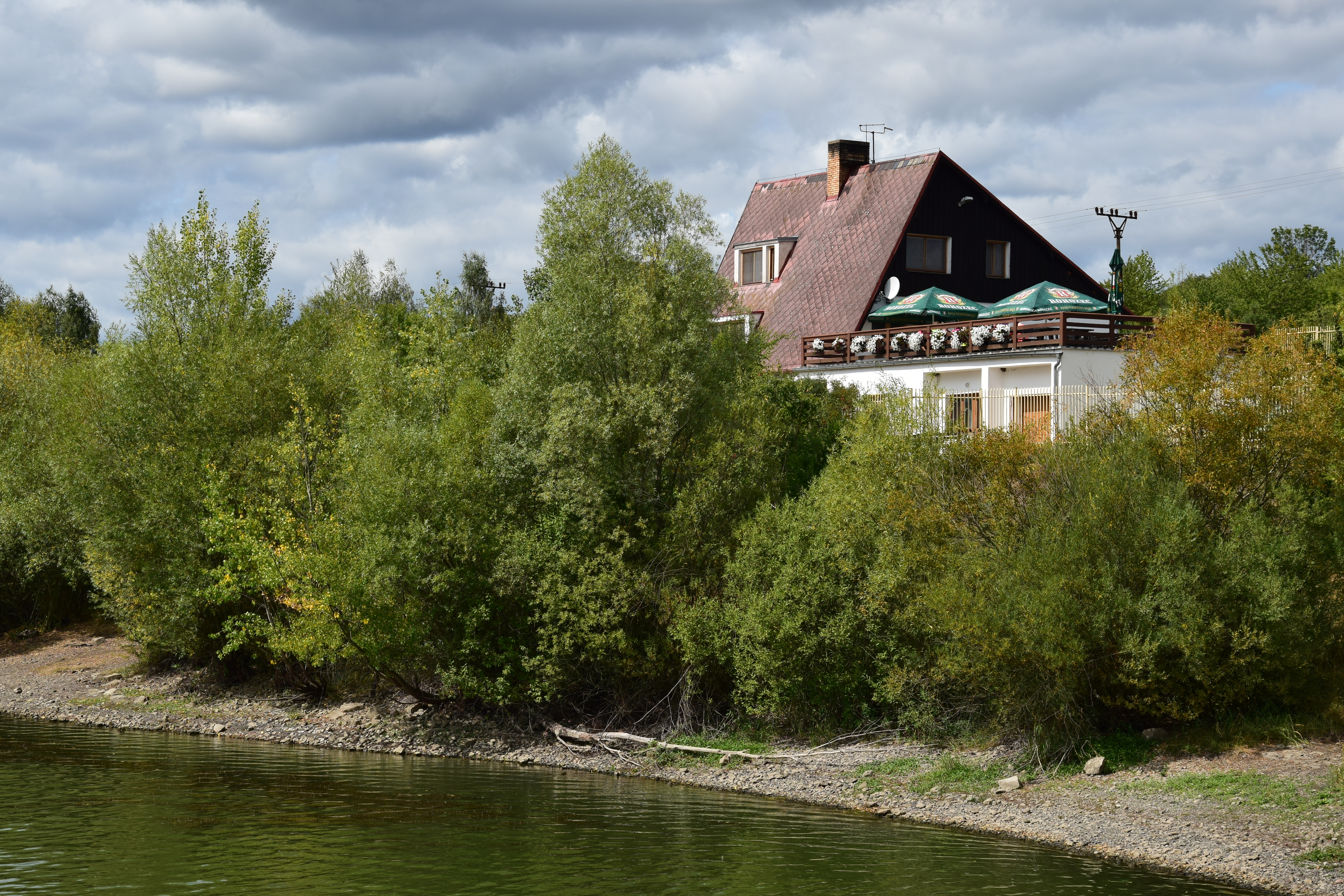 Rybník Sedlec – penzion